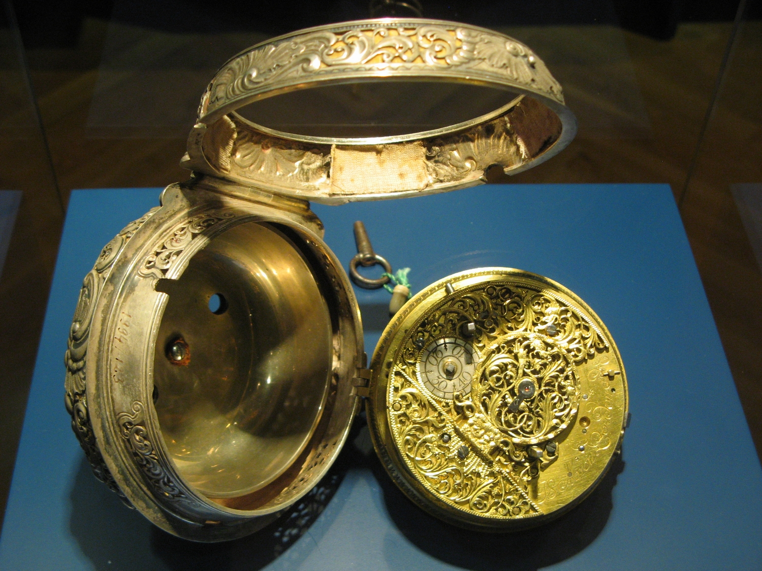 Kutschenuhr mit Übergehäse; um 1750; Friedberg, Heimatmuseum (Inv. Nr. 1994/123)